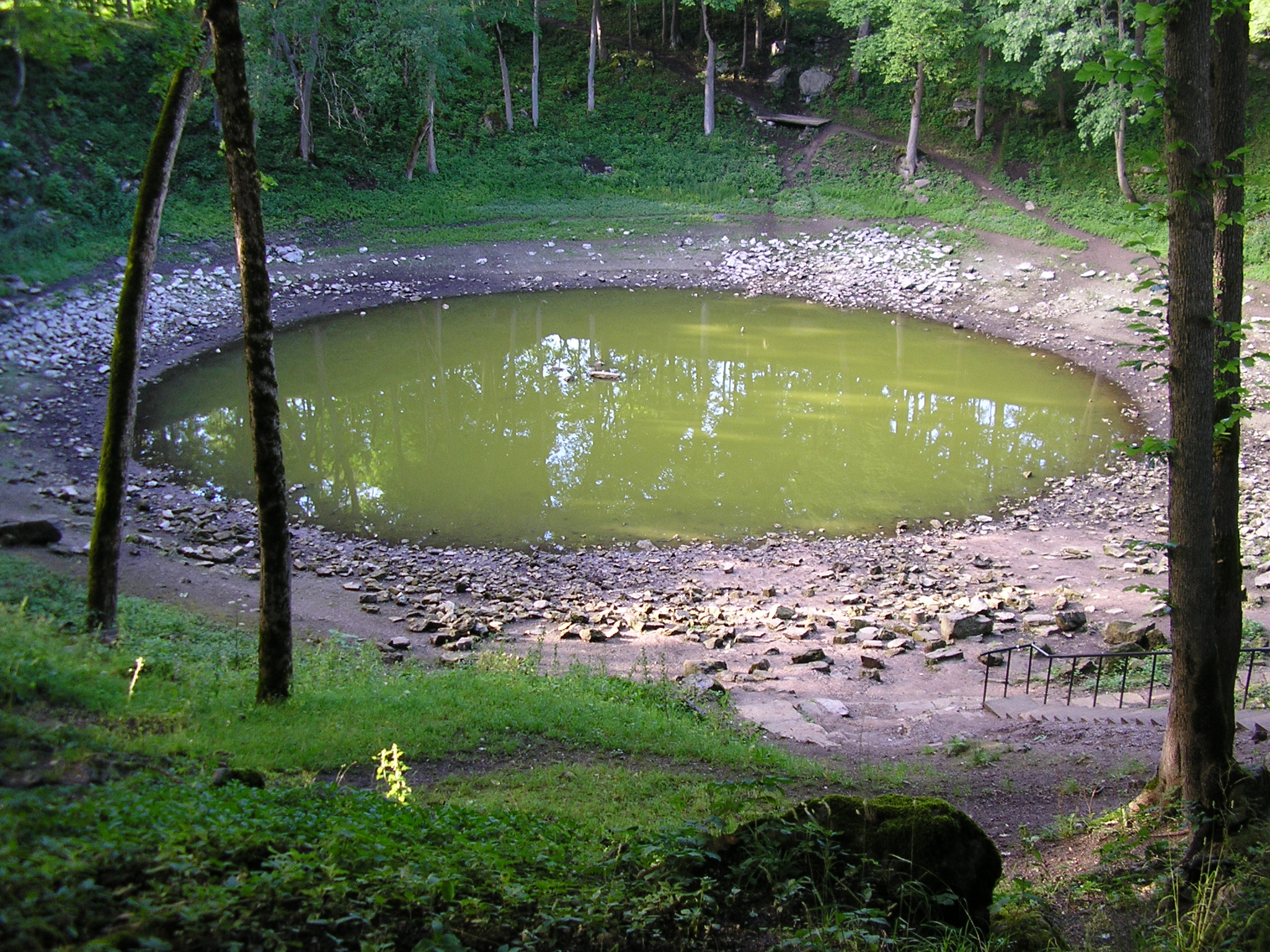 Kaali main meteorite crater on 10 August 2005.